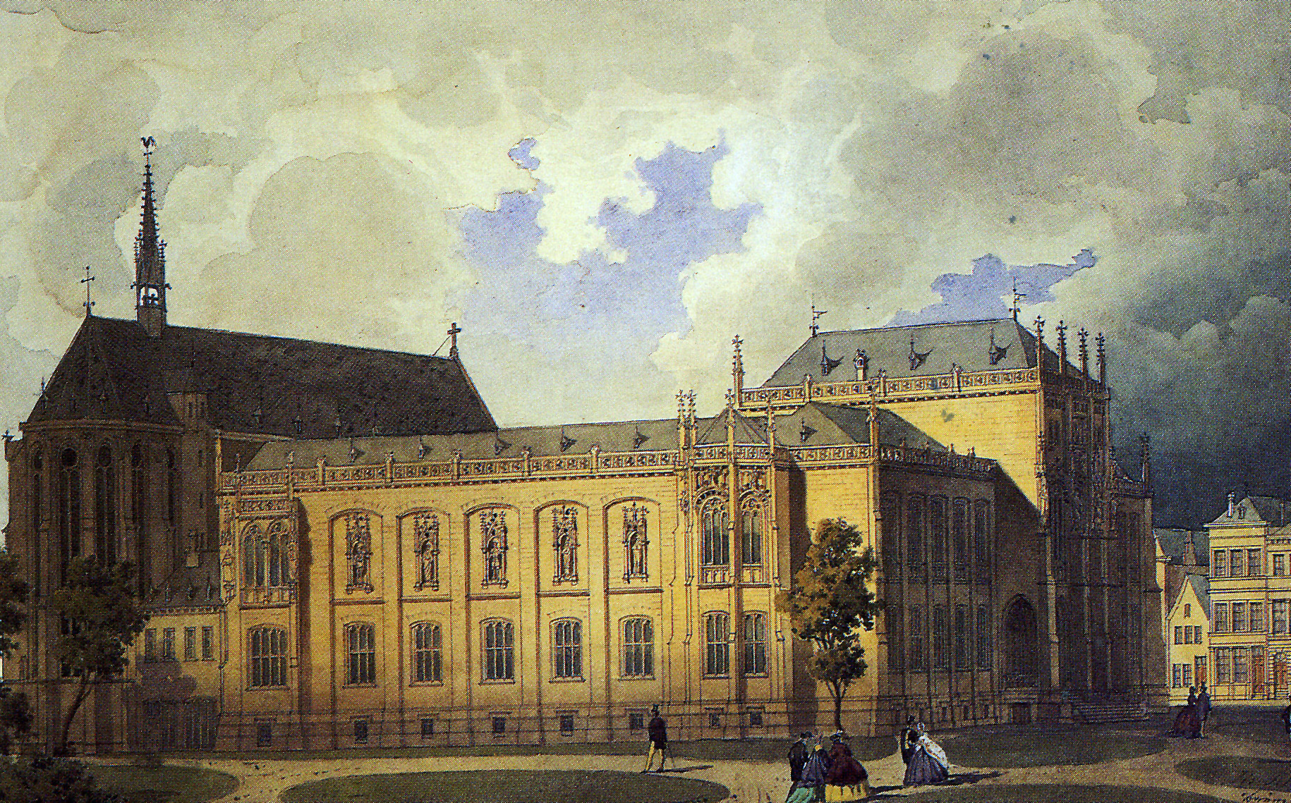 Wallraf-Richartz-Museum (1861 Aquarell, Kölnisches Stadtmuseum, Graphische Sammlung). Das Museumsgebäude wurde im Stil der englischen Gotik gebaut. Architekten: Josef Felten, Julius Raschdorf und Friedrich August Stüler.